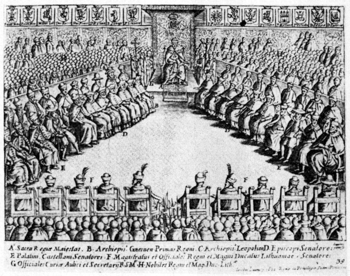 Polski Sejm, 1622.